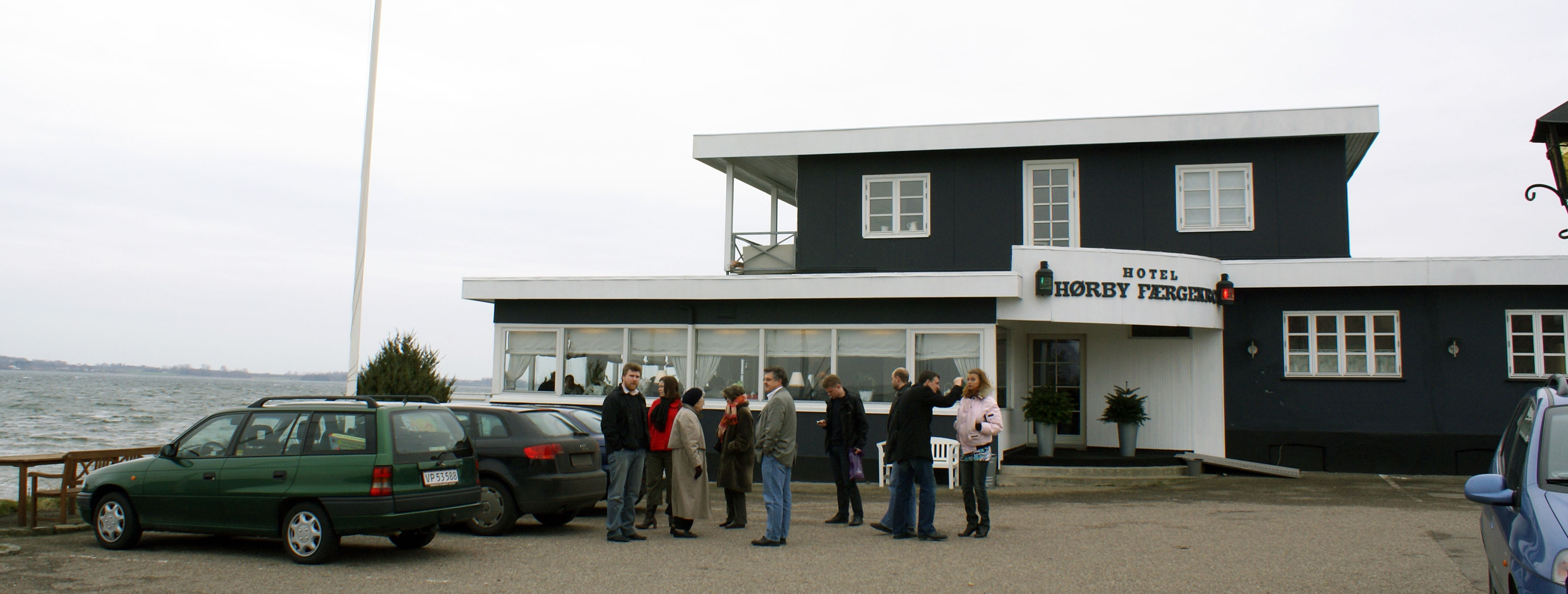 Hørby Færgekro, Hoerby Faergekro near Holbaek Fjord